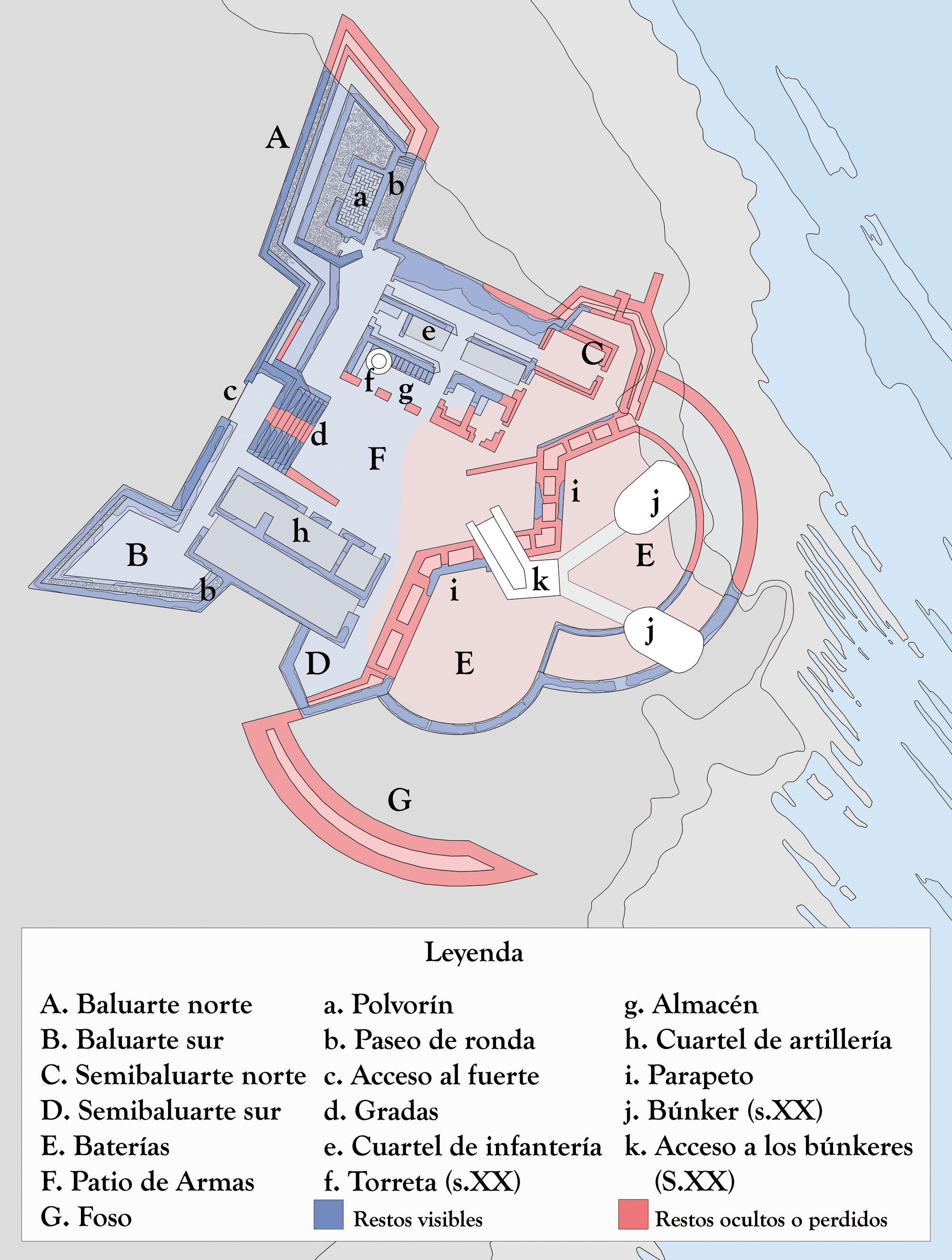 Plano del Fuerte de San García, Algeciras (España).